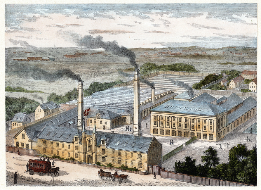 Træsnit af Rubens Fabrikker på Frederiksberg i Illustreret Tidende 1879-80, nr. 1072, April 11, 1880.